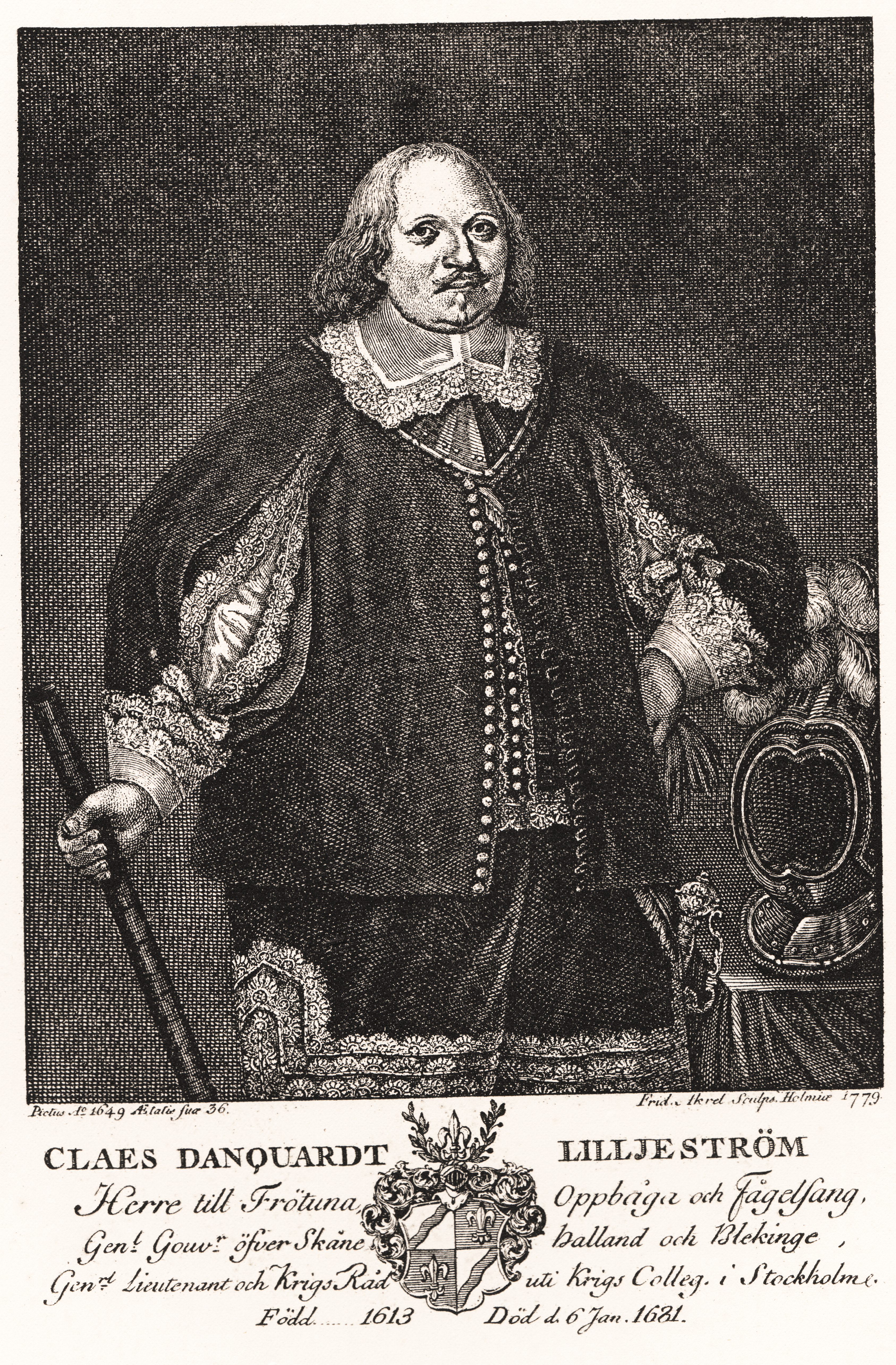 Claes Danckwardt-Lillieström (1613-1681). Kopparstick utfördt af F. Acrel, så sent som 1777. Samma typ finnes i mycket litet format, sannolikt af Glassbach, samt i aquatintamanér af I. B. Berndes, efter J. v. Bredas kopia af porträttet i Vitterhets-, Hist.- och Antikv.-Akademien; i Sv. Biogr. Lexikon uppgifves det åtföljt Hammarskölds upplaga af Stiernhielms Vitterhetsarbeten, men återfinnes dock ej i K. Bibliotekets exemplar.